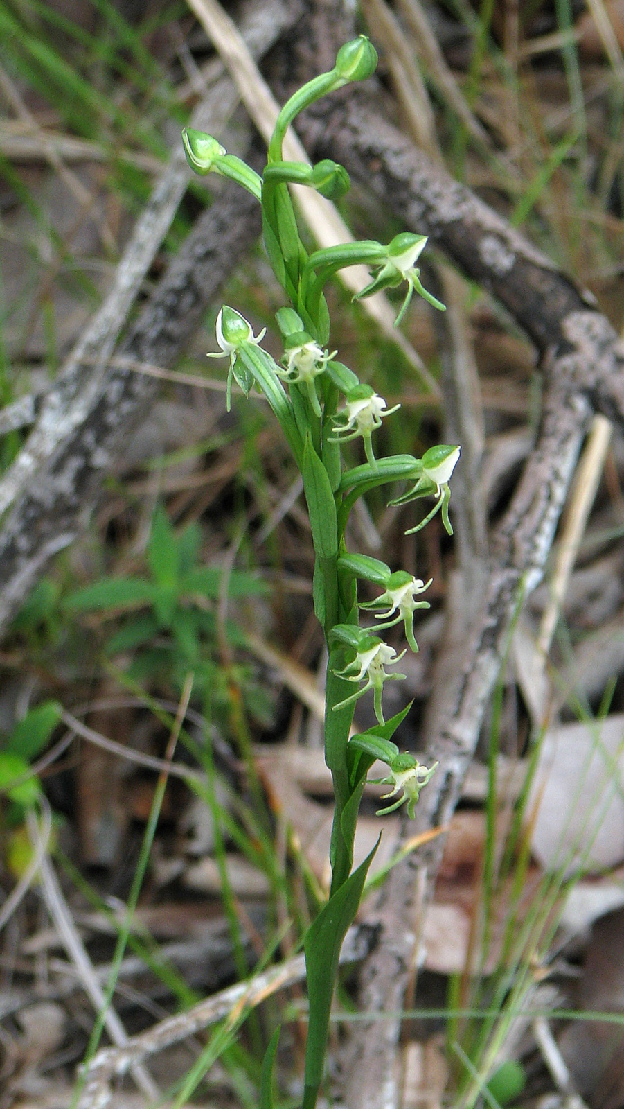 Habenaria rodeiensis Barb.Rodr.